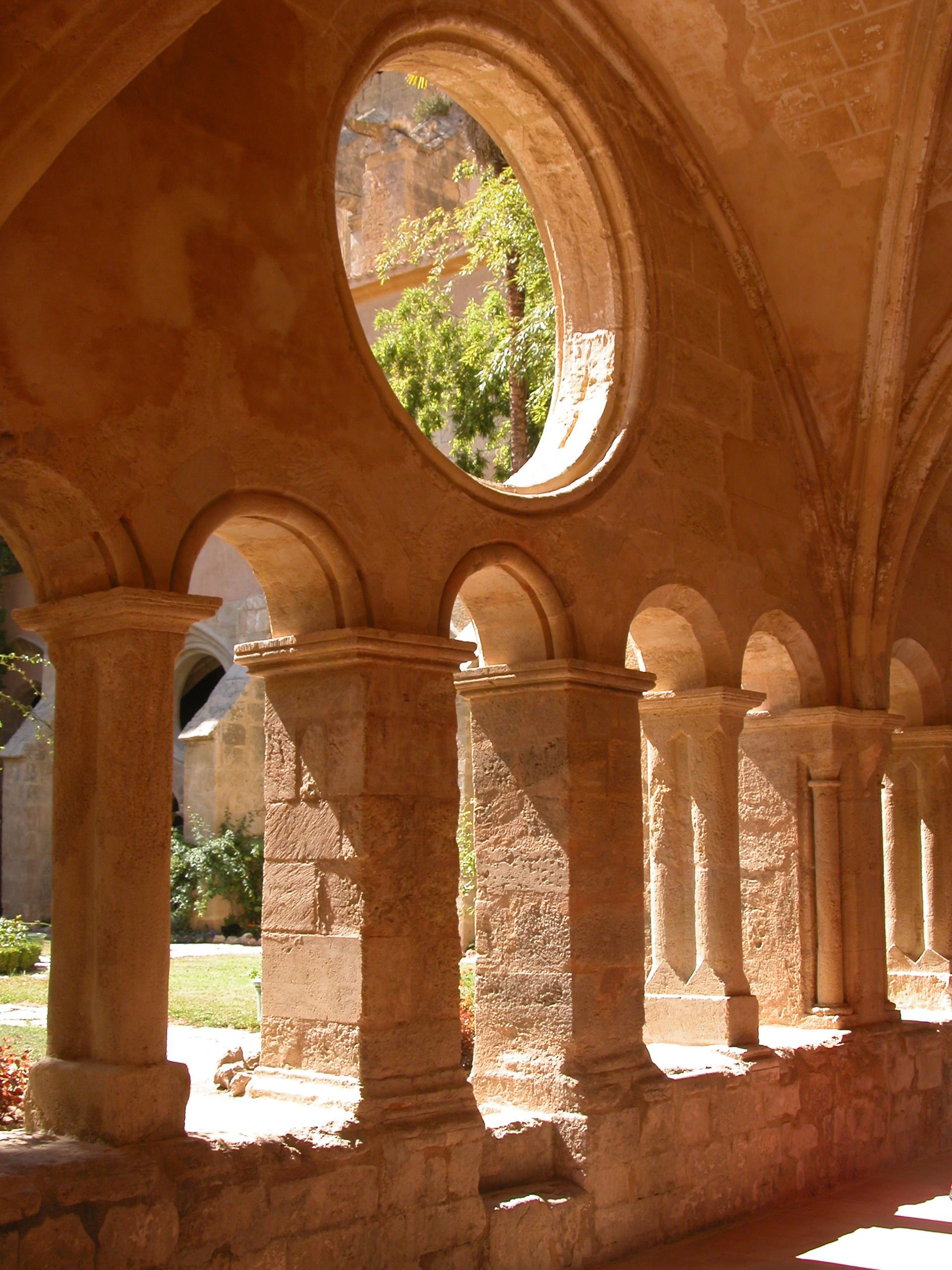 Abbaye de Valmagne - Photo personnelle.